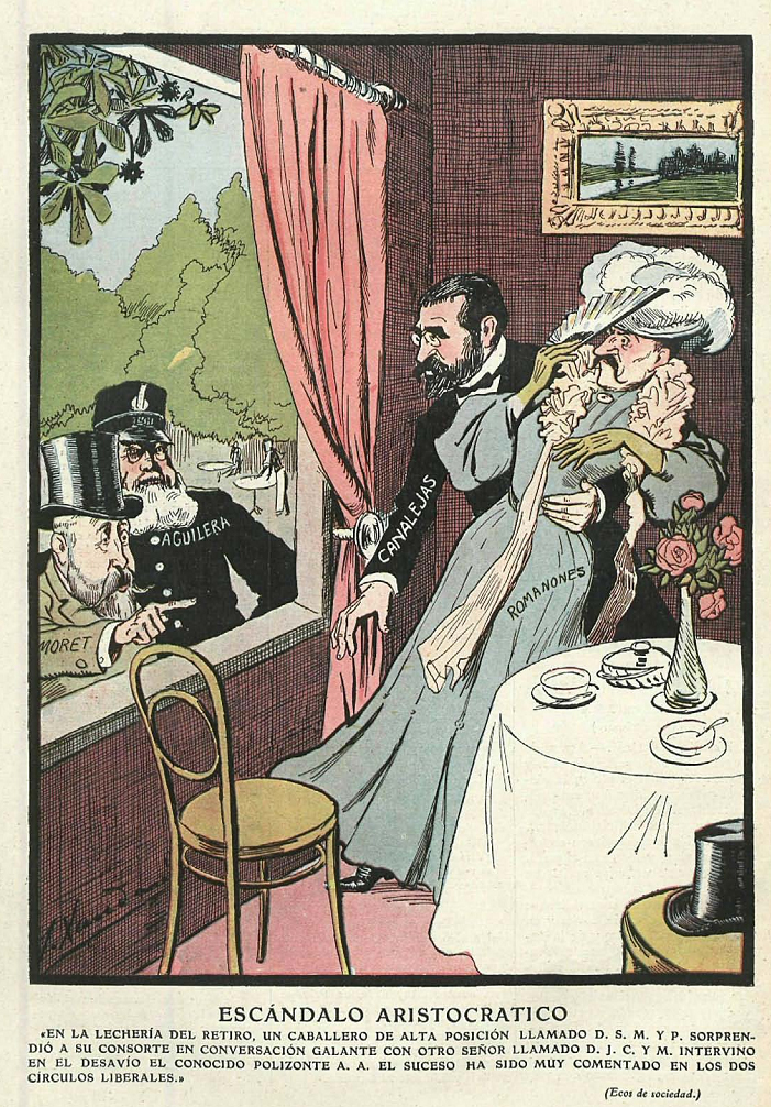 Escándalo aristocrático, en la revista satírica española Gedeón.